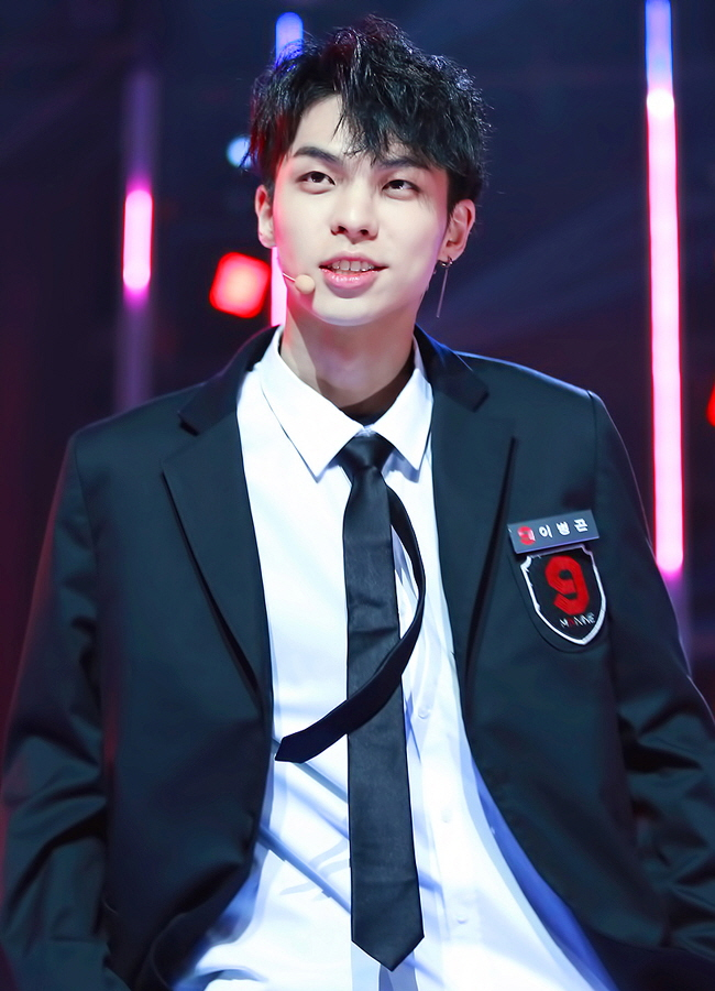 180126 믹스나인 생방송 파이널 (이병곤)